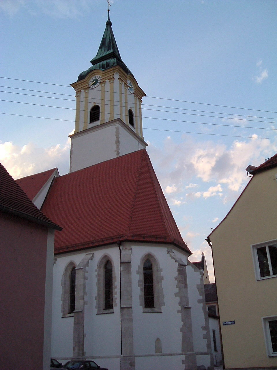 Abensberg - Stadtpfarrkirche St. Barbara, Juni 2004 Public Domain, eigene Aufnahme Möglichkeiten zur Lizenzierung, bitte die nicht-benötigte Variante aus dem Code löschen